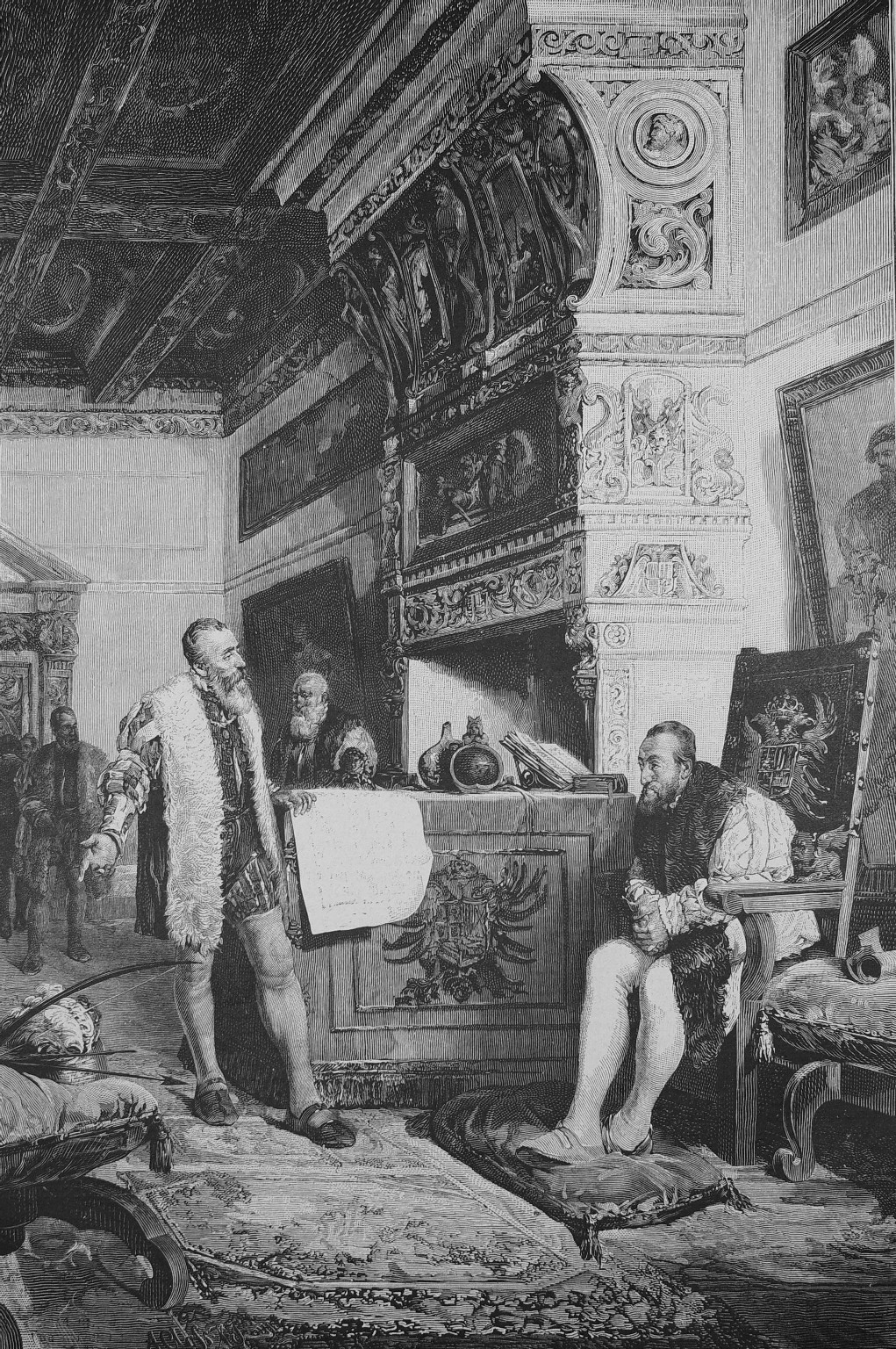 Grabado que representa al conquistador Francisco Pizarro exponiendo al emperador Carlos V las pruebas del descubrimiento del Imperio de los Incas. Toledo, 1529.